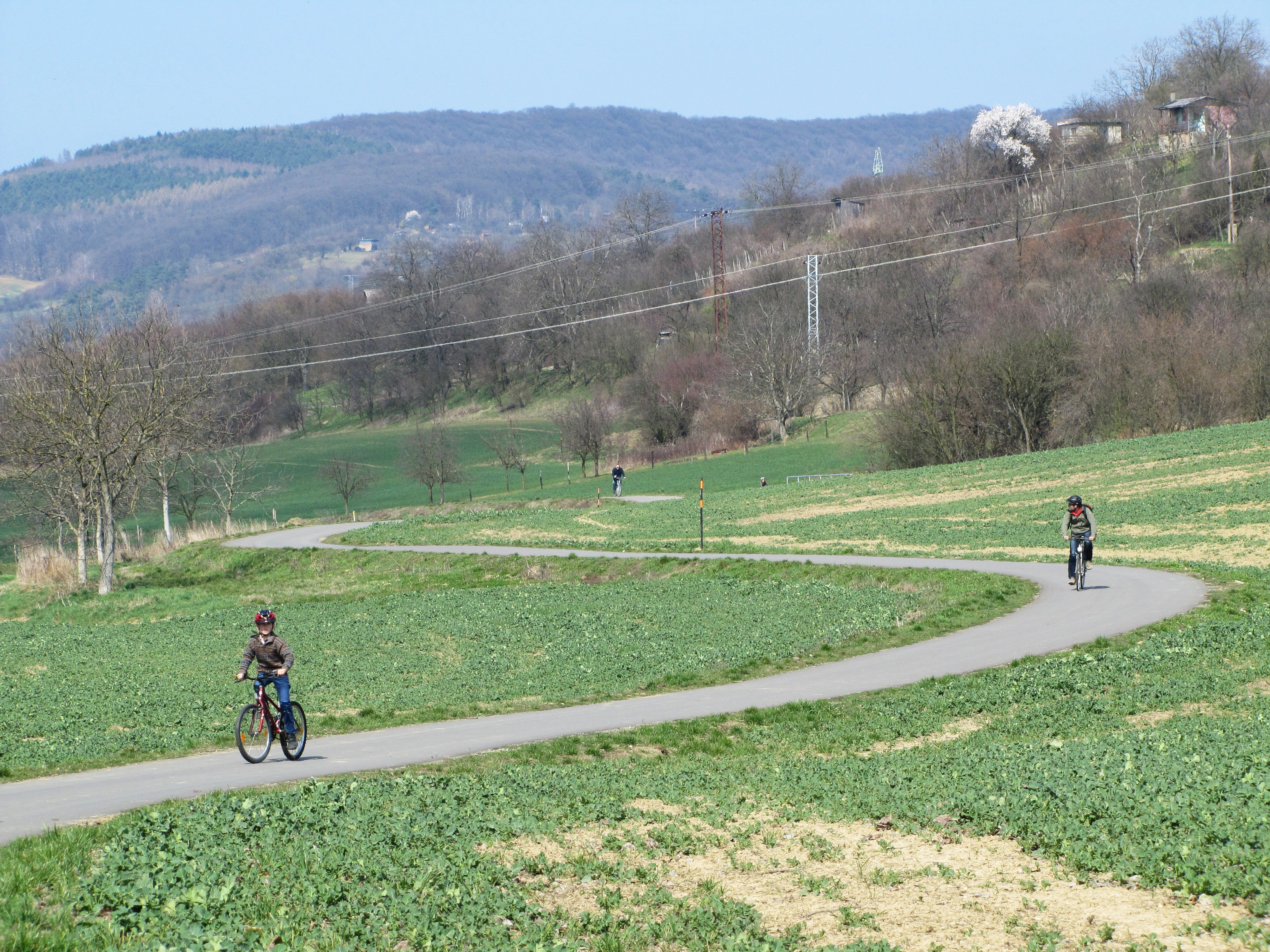 Cyklostezka mezi Kyjovem a Bohuslavicemi